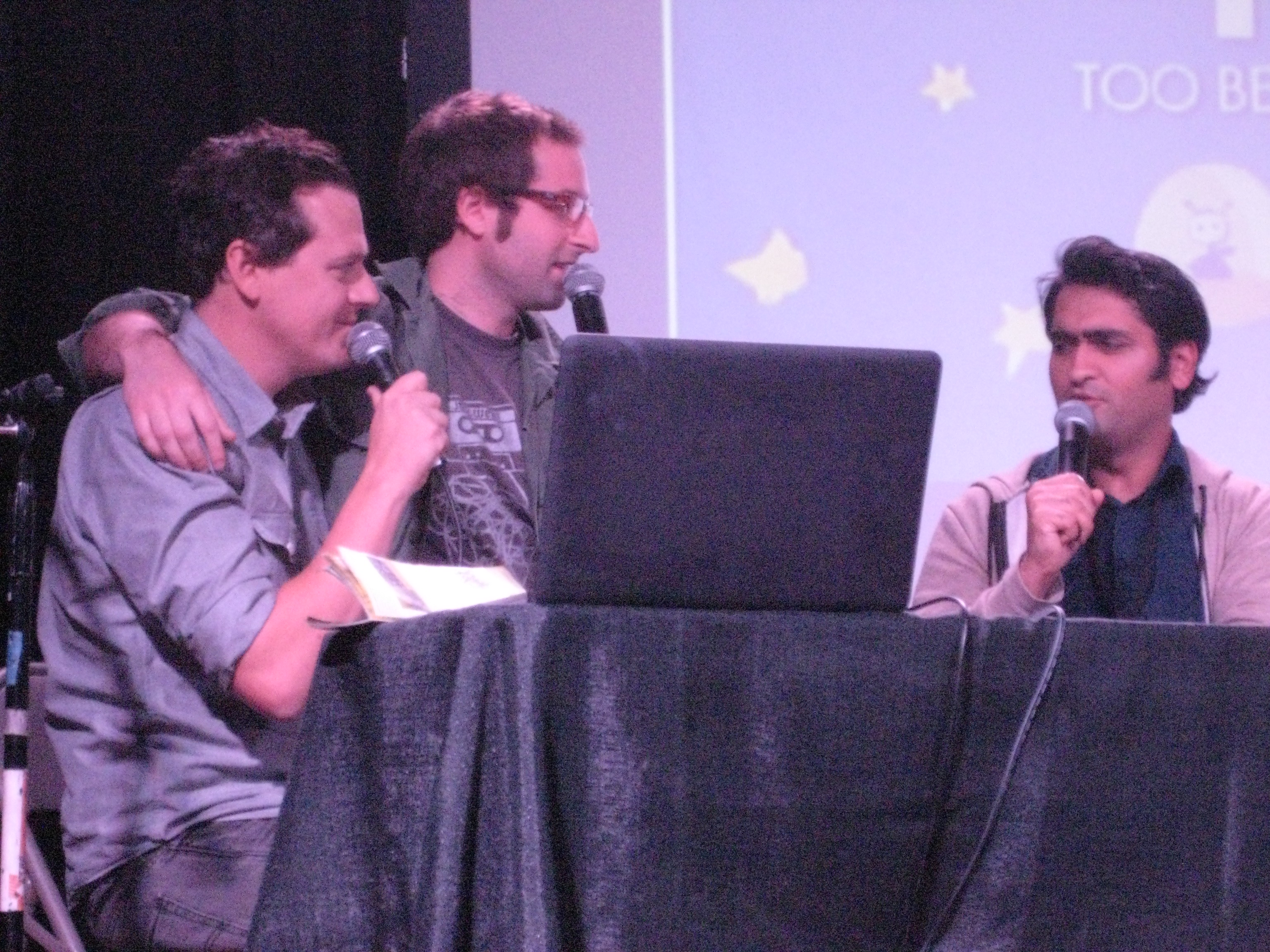 Luke Burbank, Sean DeTore, Kumail Nanjiani (yes, Sean is sitting on Luke's lap)